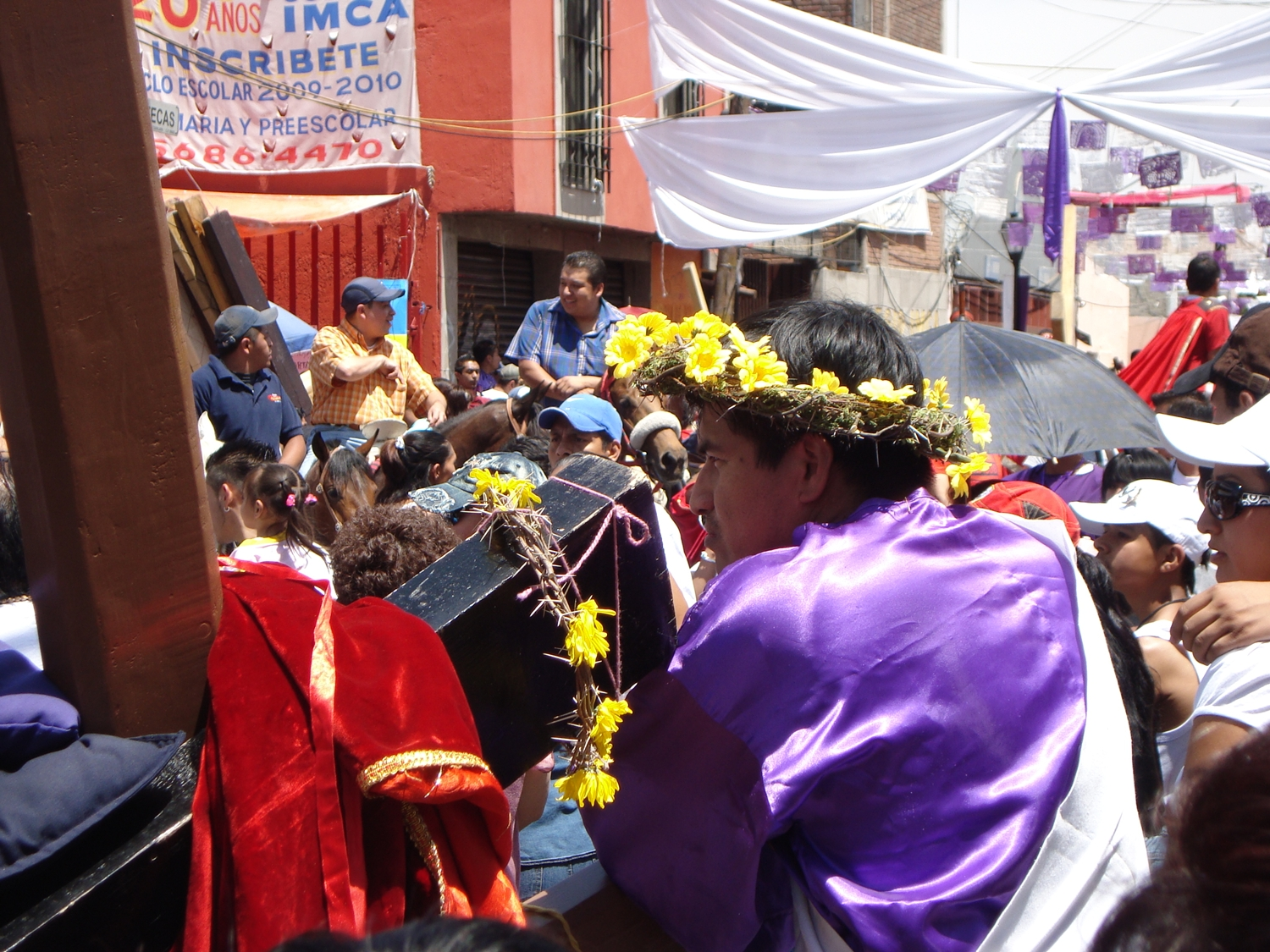 Un nazareno observa recargado en su cruz el paso de otros nazarenos y participantes en la representación de la Pasión de Cristo en Iztapalapa. La imagen fue tomada en la esquina de Aztecas y 5 de Mayo, Barrio de San Lucas de Iztapalapa, frente a la parroquia de este santo que es patrono de los Ocho Barrios.